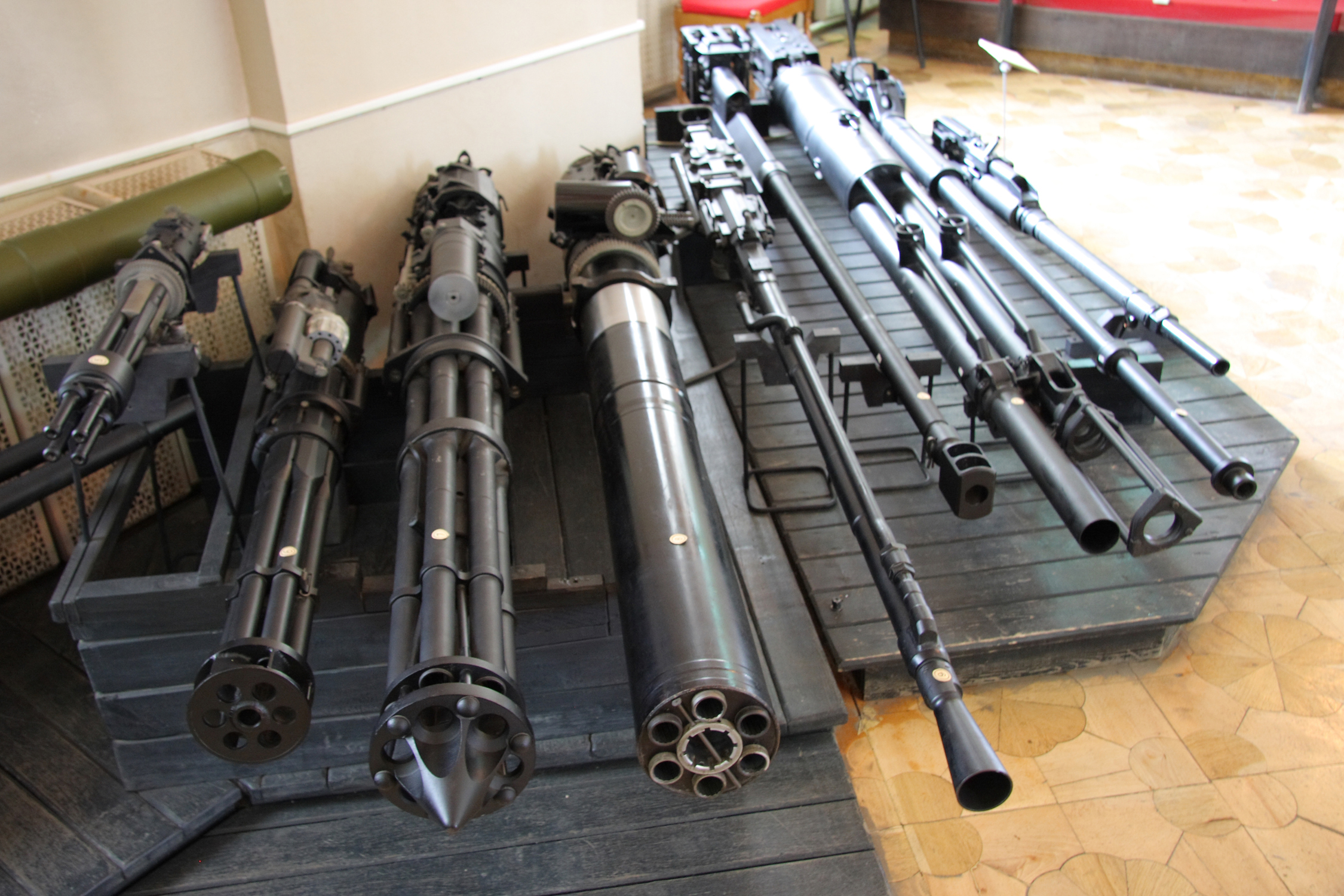 Современное стрелково-пушечное вооружение (Modern canon armament)